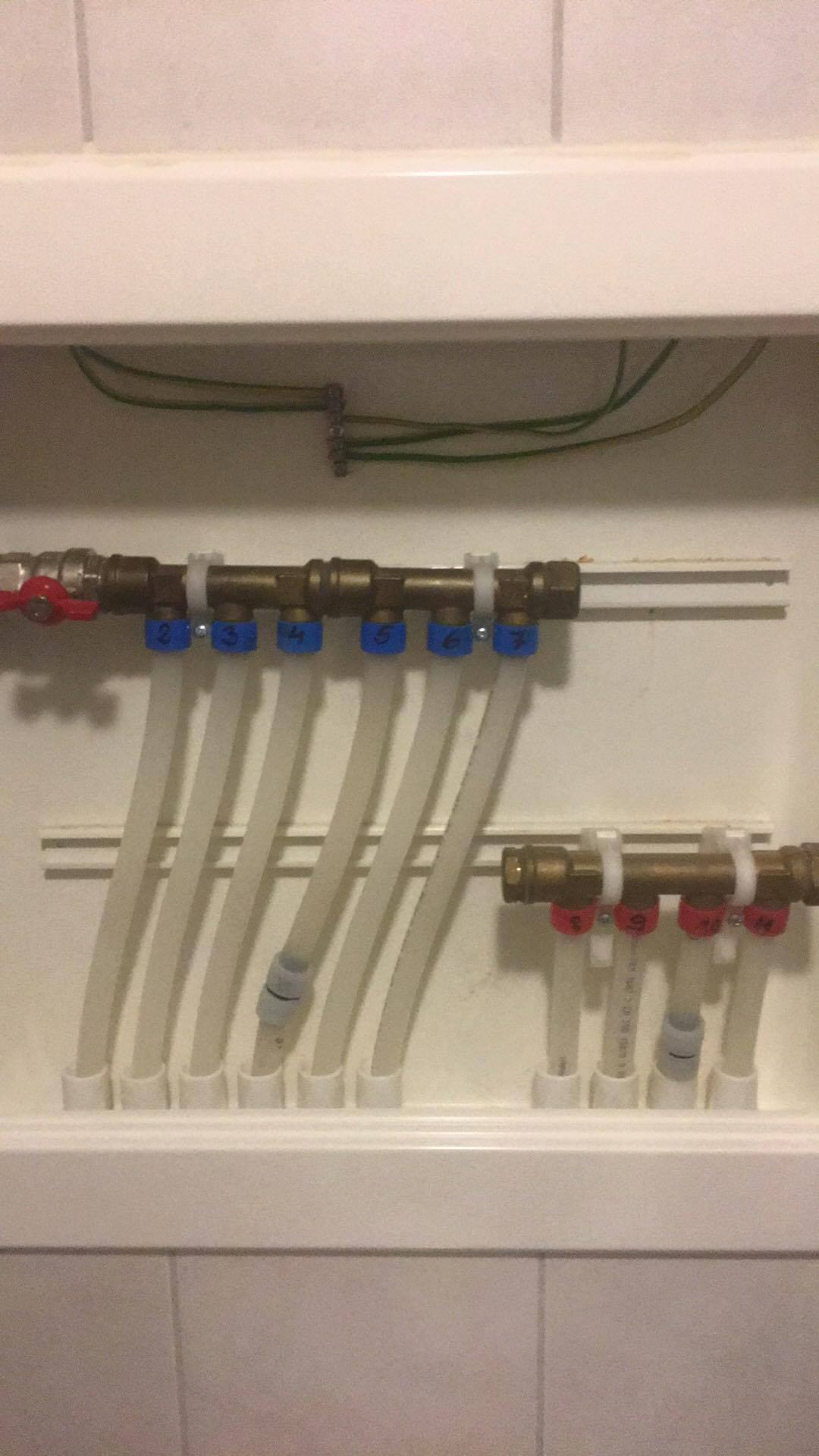 Bildet viser hvordan rør-i-rør systemet er koblet i fordelerskapet